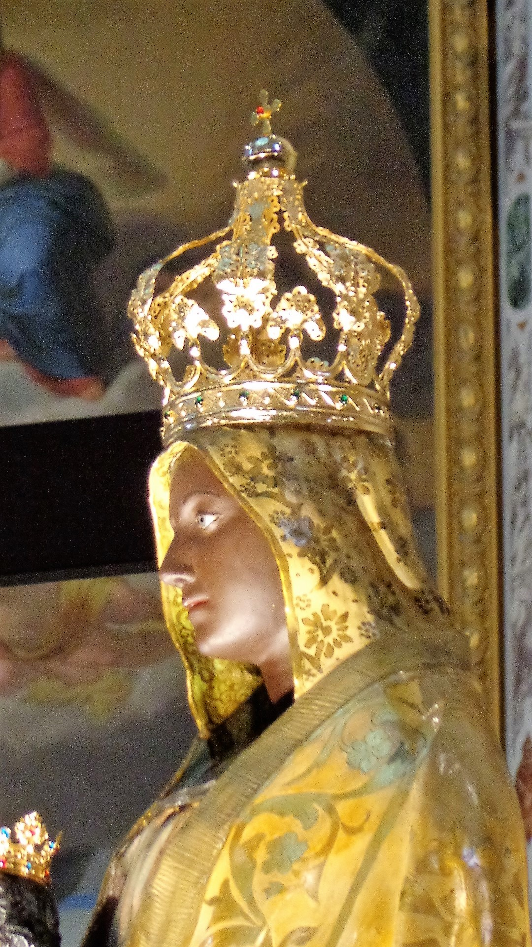 Icona raffigurante Maria Santissima del Tindari, opera di Matteo Trovato.